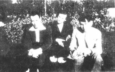 Atsız'ın Askeri Tıbbiye yıllarına ait başka bir görsel